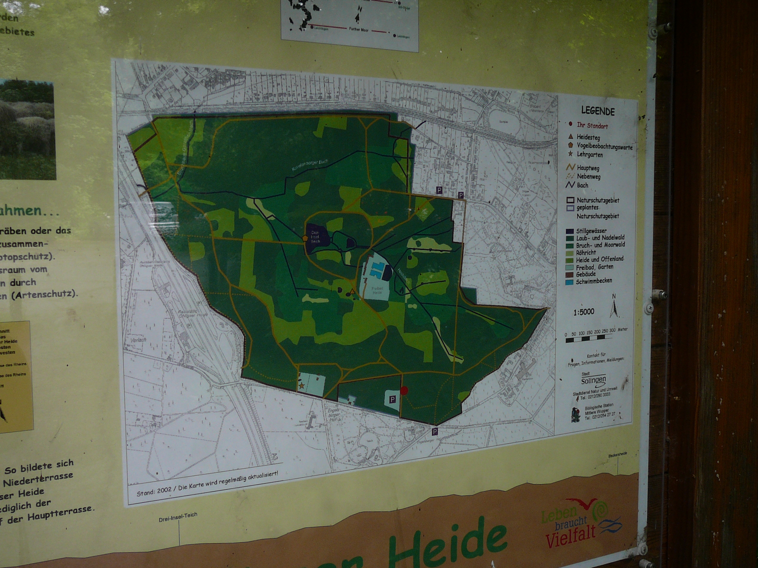 Ohligser Heide, Solingen